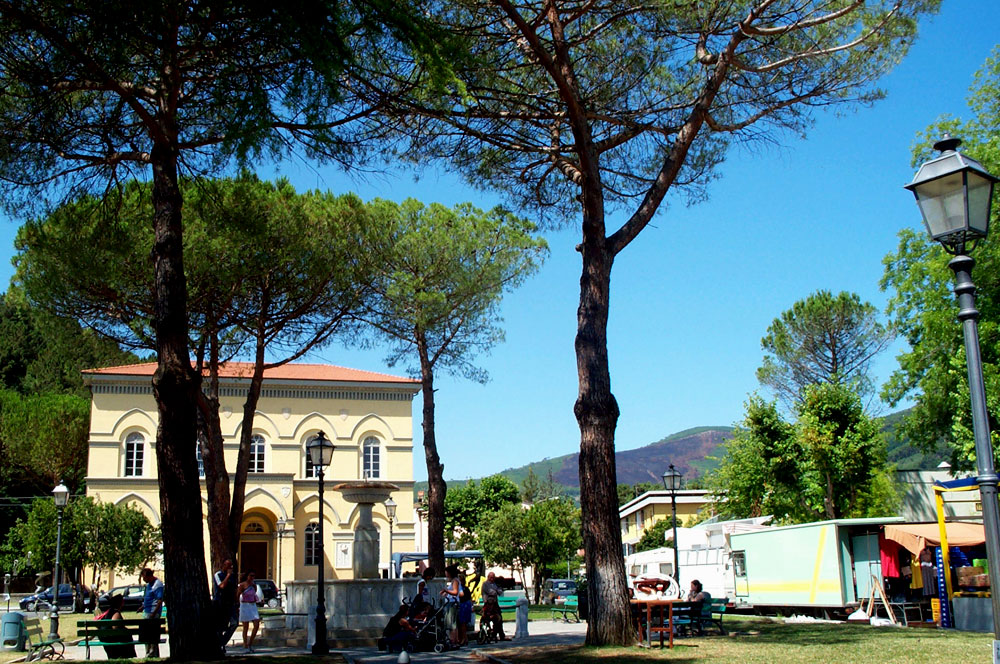 Marché sur la piazza G. Cavalca à Vicopisano en Toscane - Italie